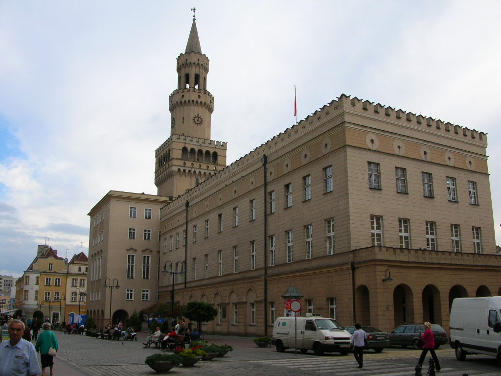 Ratusz Opolski